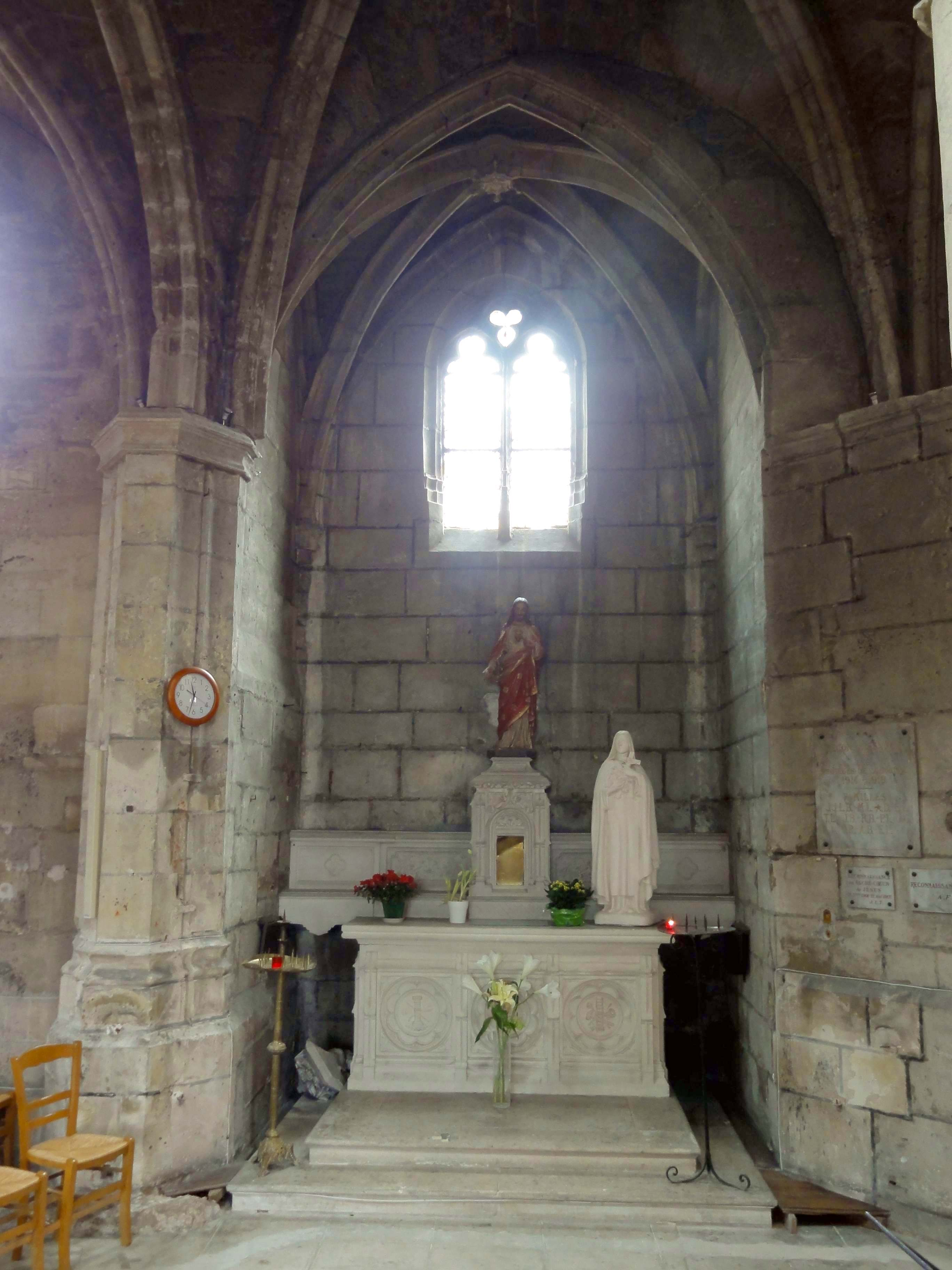 Intérieur de l'église - voir titre.